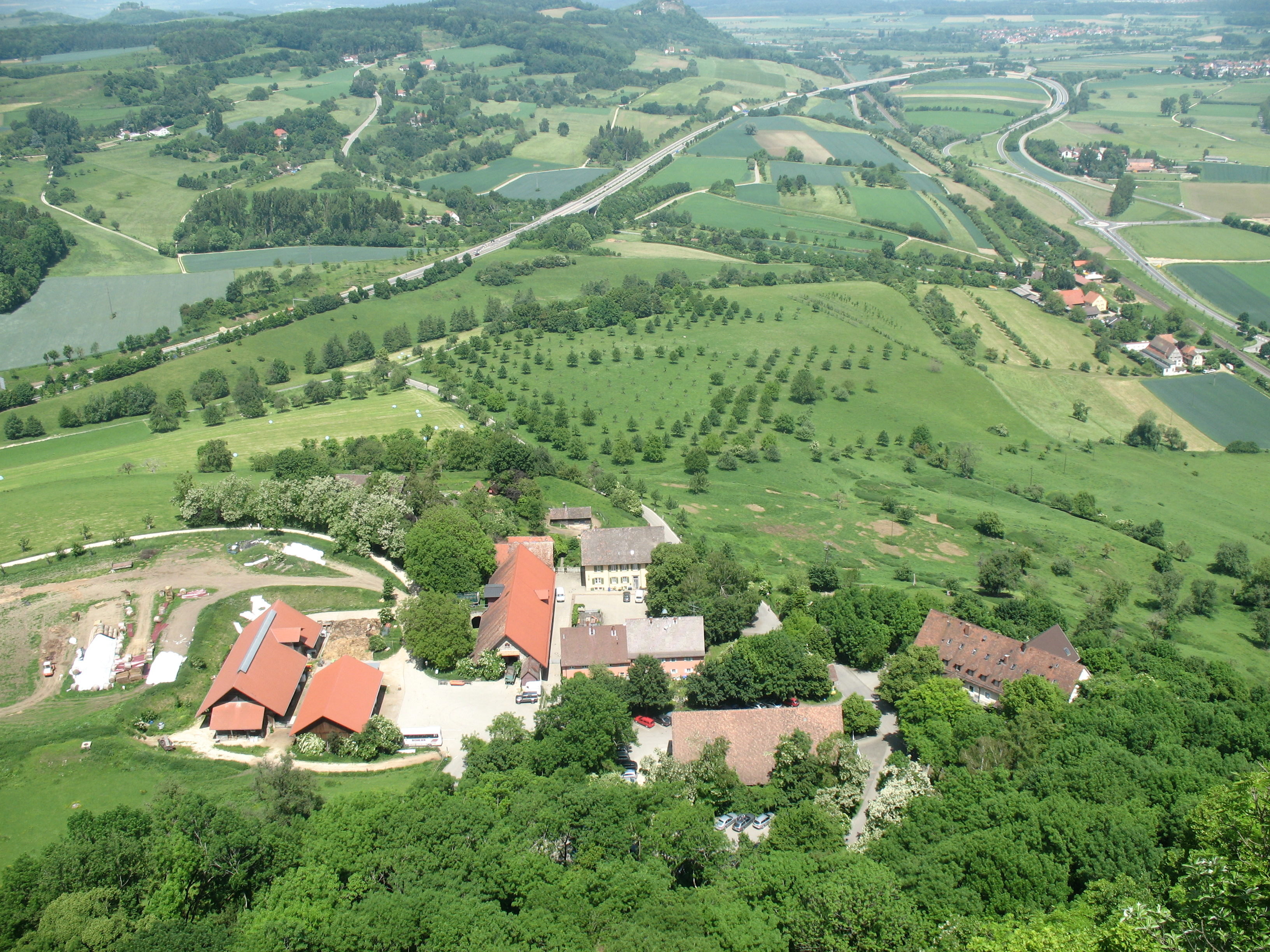 Blick vom Schmittefelsen über die Nordausläufer des Hohentwiel und die Bauernhöfe, welche die Flächen des Berges bewirtschaften: "Dömane Höhentwiel" (Vordergrund) und "Schwärzehof" (Mitte rechts außen). In der Bildmitte sind die Streuobstwiesen zu erkennen.